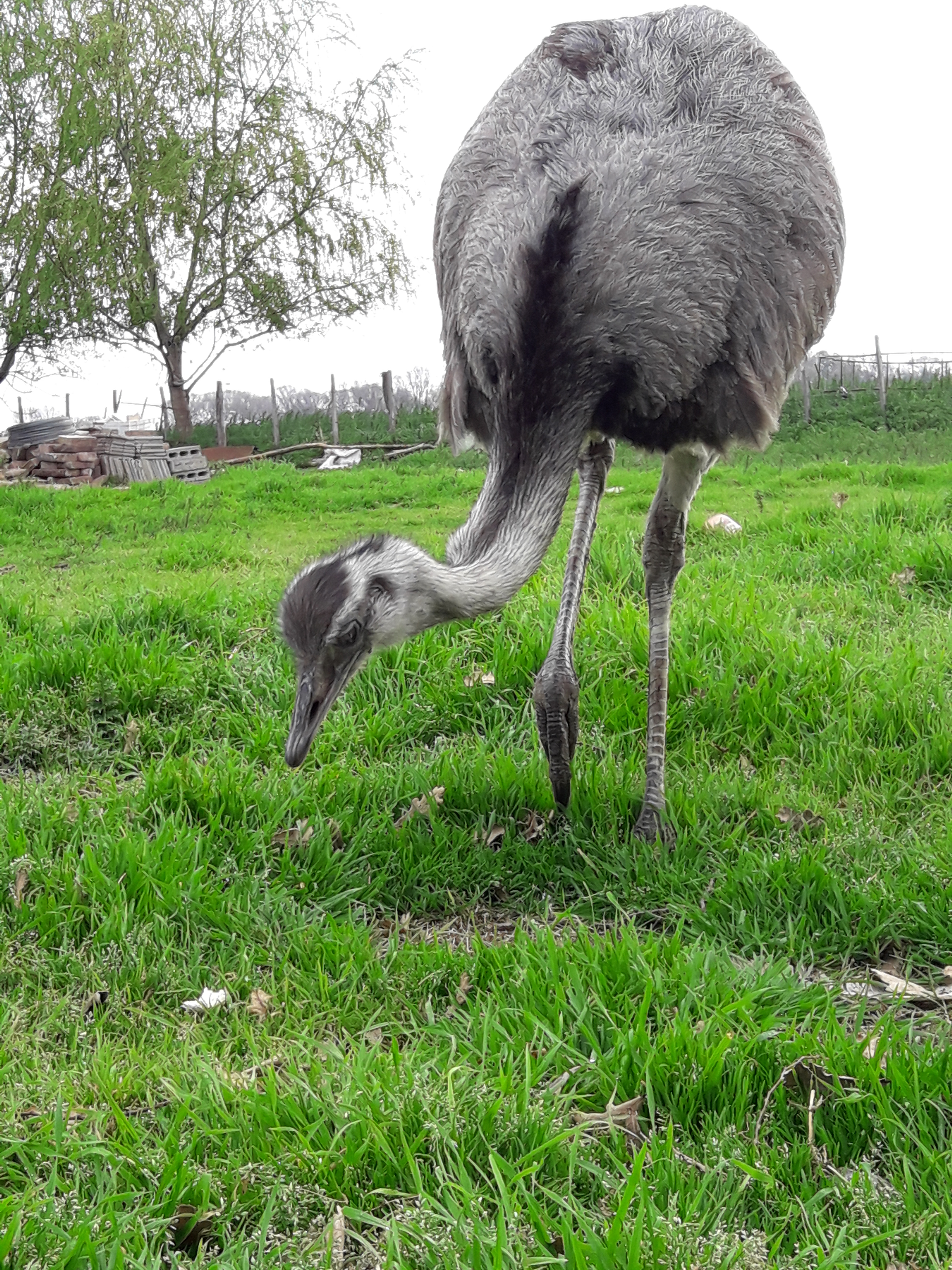 Ñandú o Rhea. Ubicado en el norte pampeano